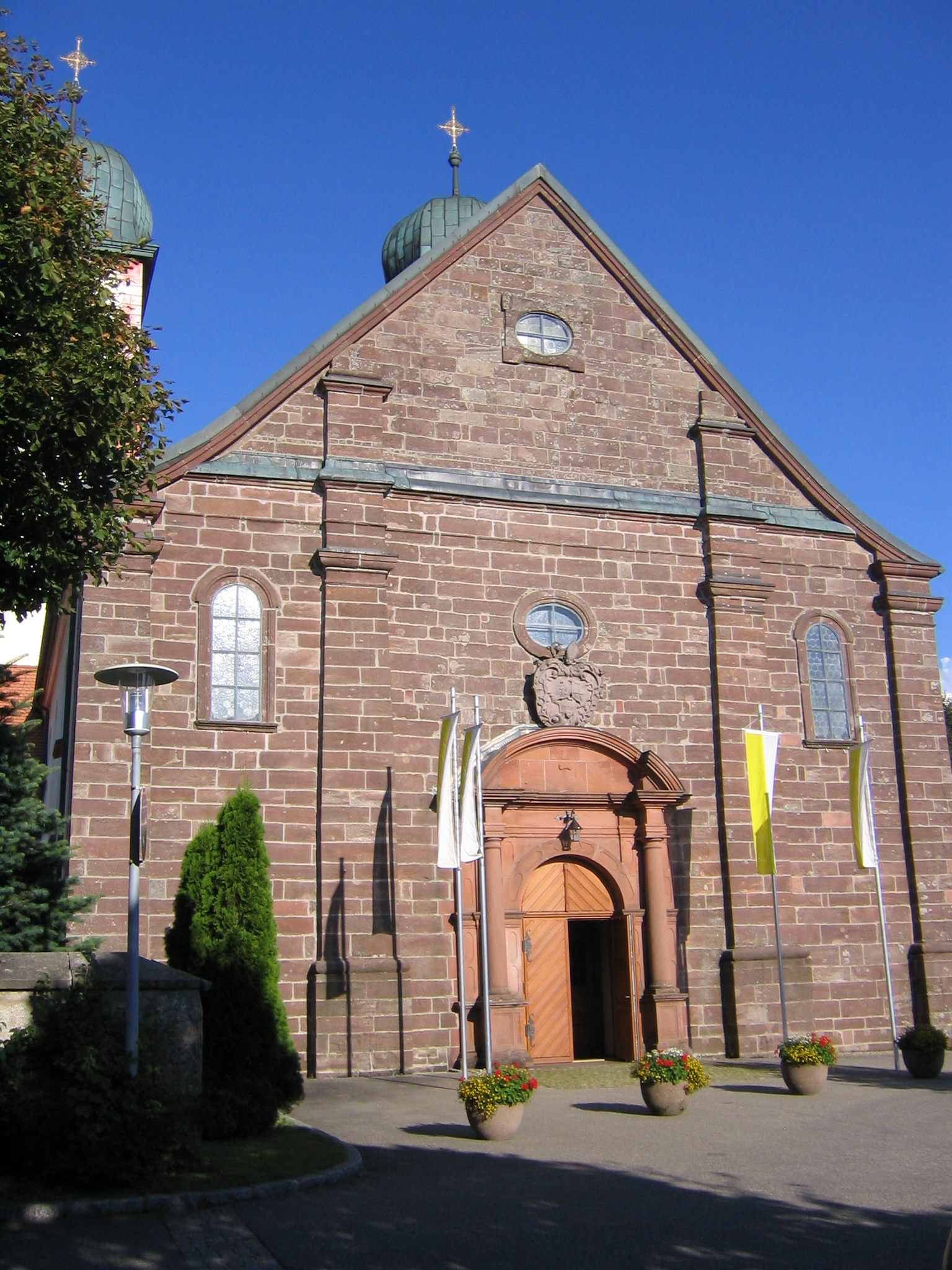 Eingang zur Klosterkirche St. Märgen